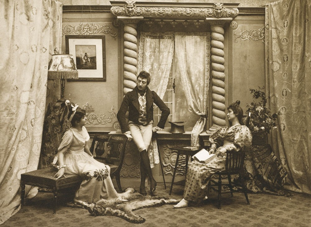 Der Besuch, Foto mit noblem Hintergrund